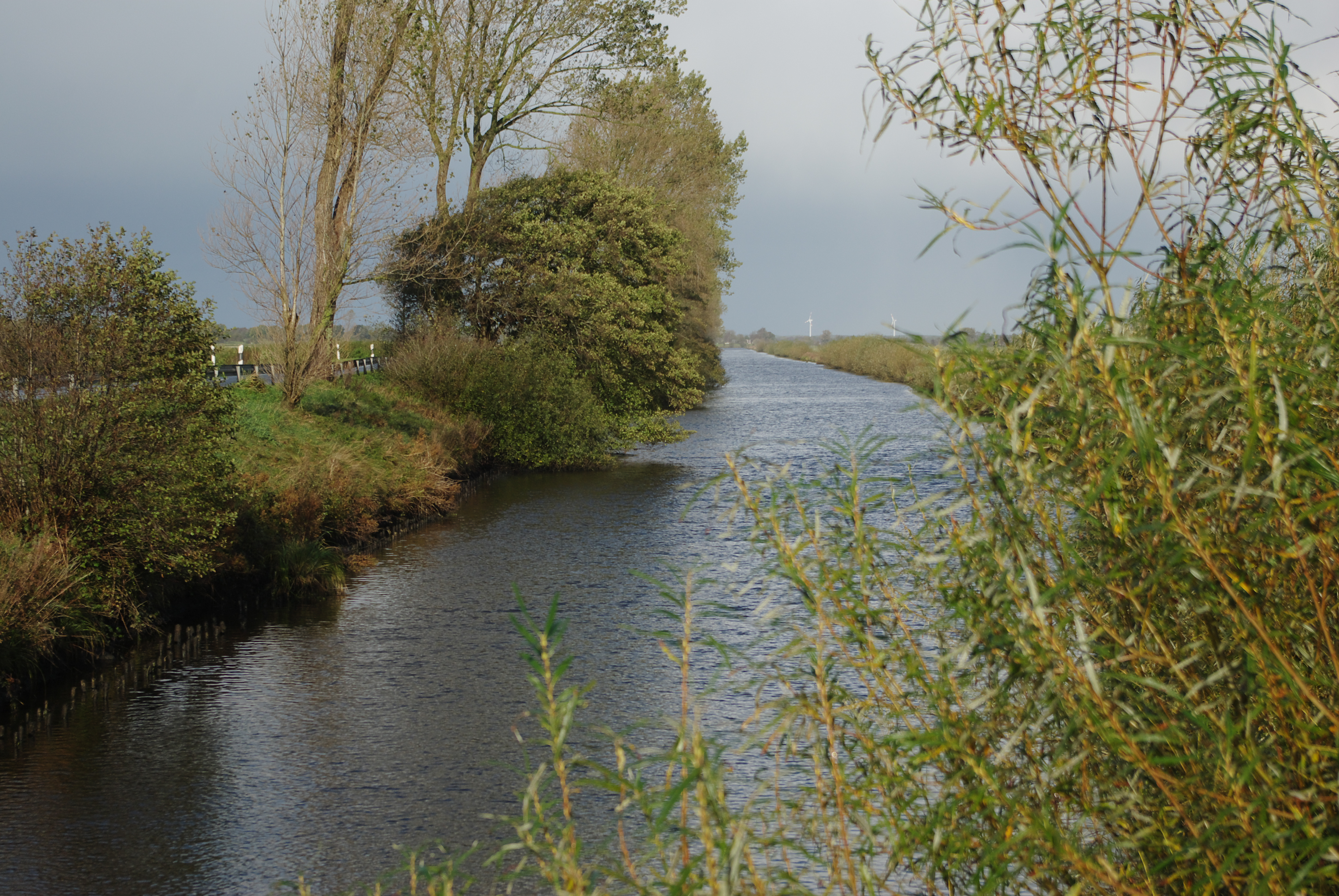 Sorge Neue Sorge mit Umleitungsdeich (links) nahe Meggerdorf